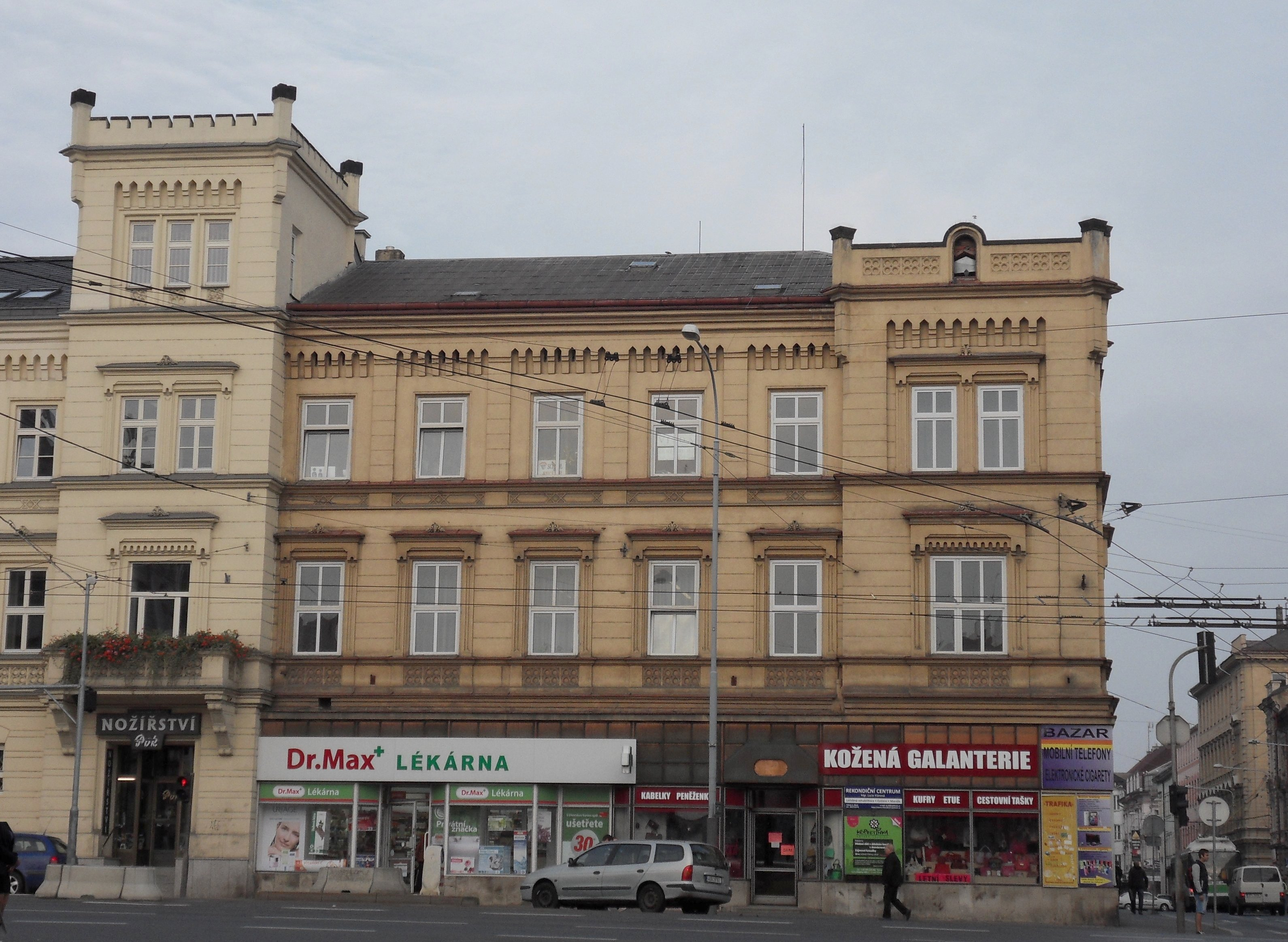 Škodův dům, Plzeň 3-Jižní Předměstí, Klatovská třída 2090/8, 348/10, Tylova 2090/1, Plzeň.